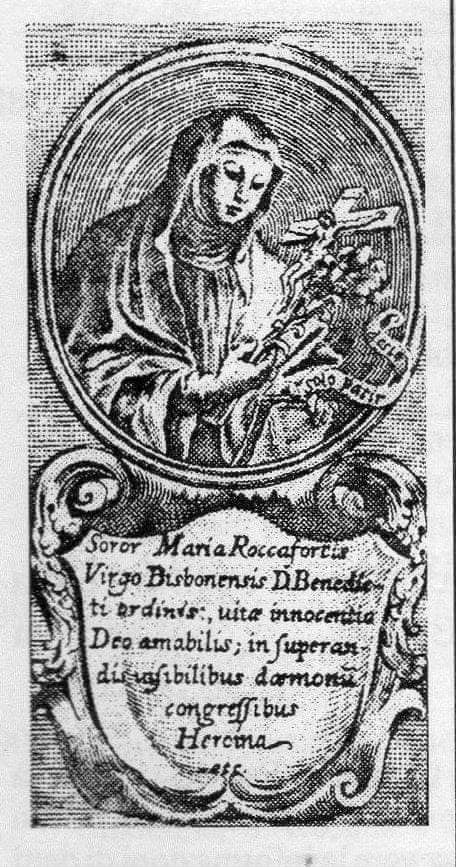 Soror Maria Roccafortis, virgo Bisbonensis